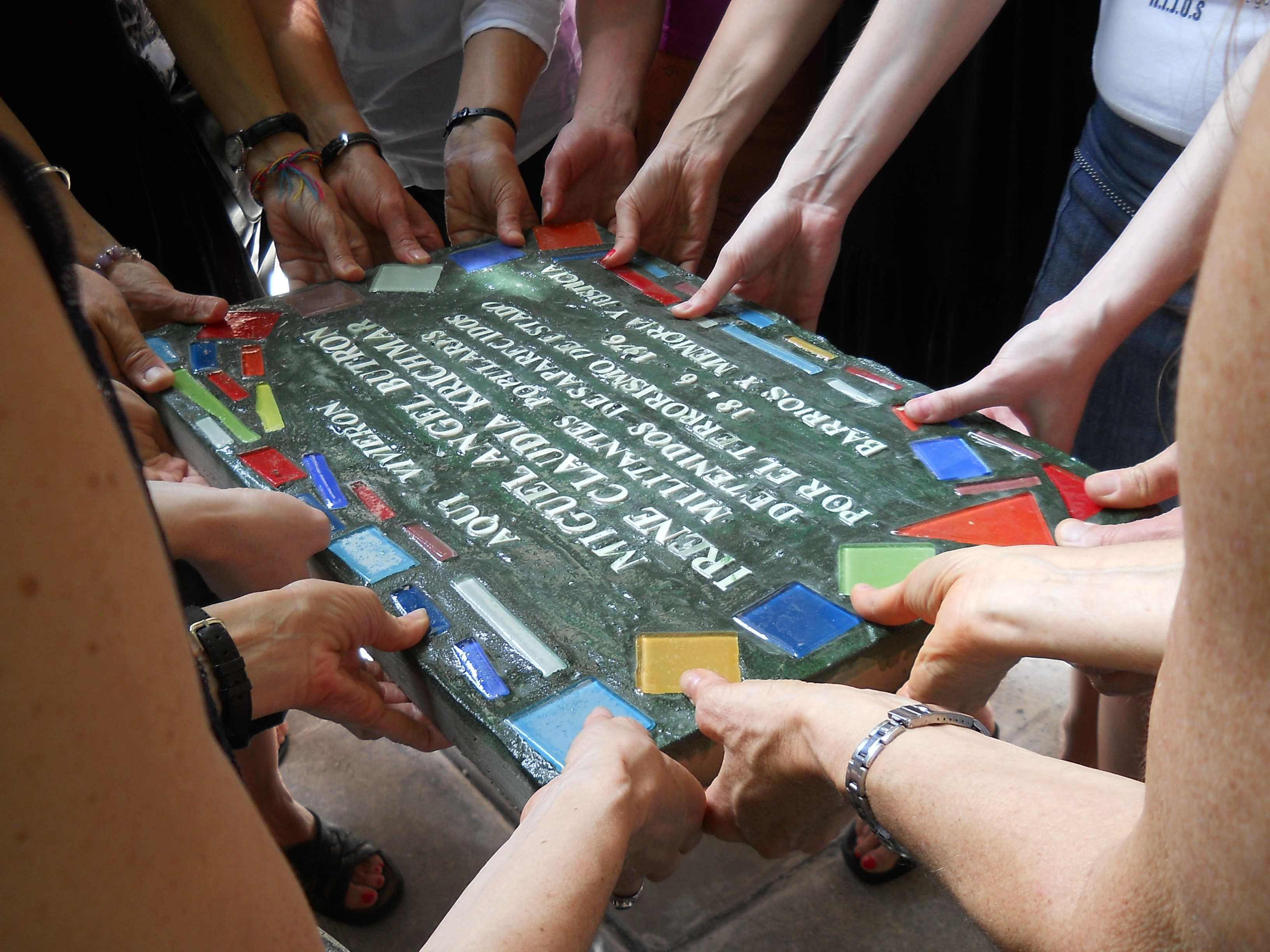 Barrios x Memoria y Justicia/Colocación de baldosa en homenaje a Irene Claudia Krichmar y a Miguel Ángel Butron donde vivieron, República de la India 3155, CABA, el 27/11/2011.